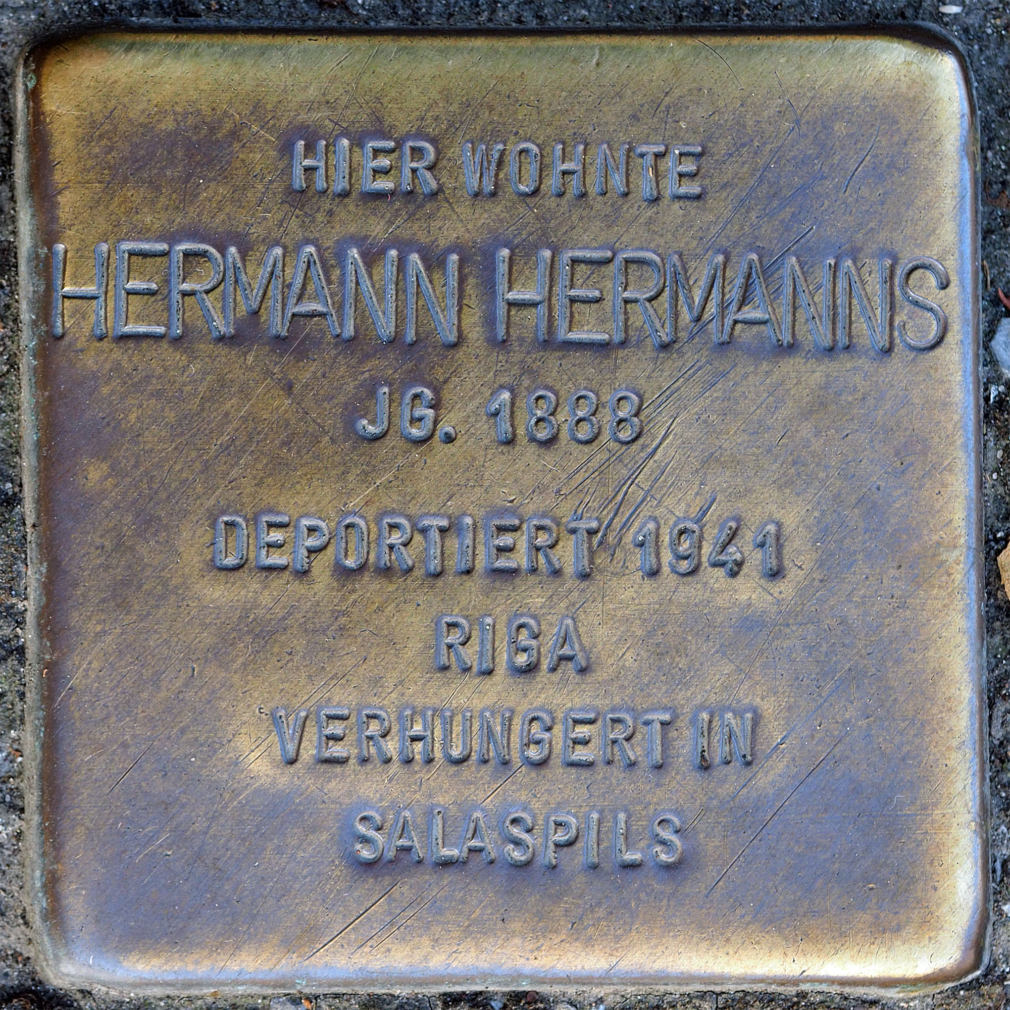 Stolpersteine MG: Hermanns, Hermann